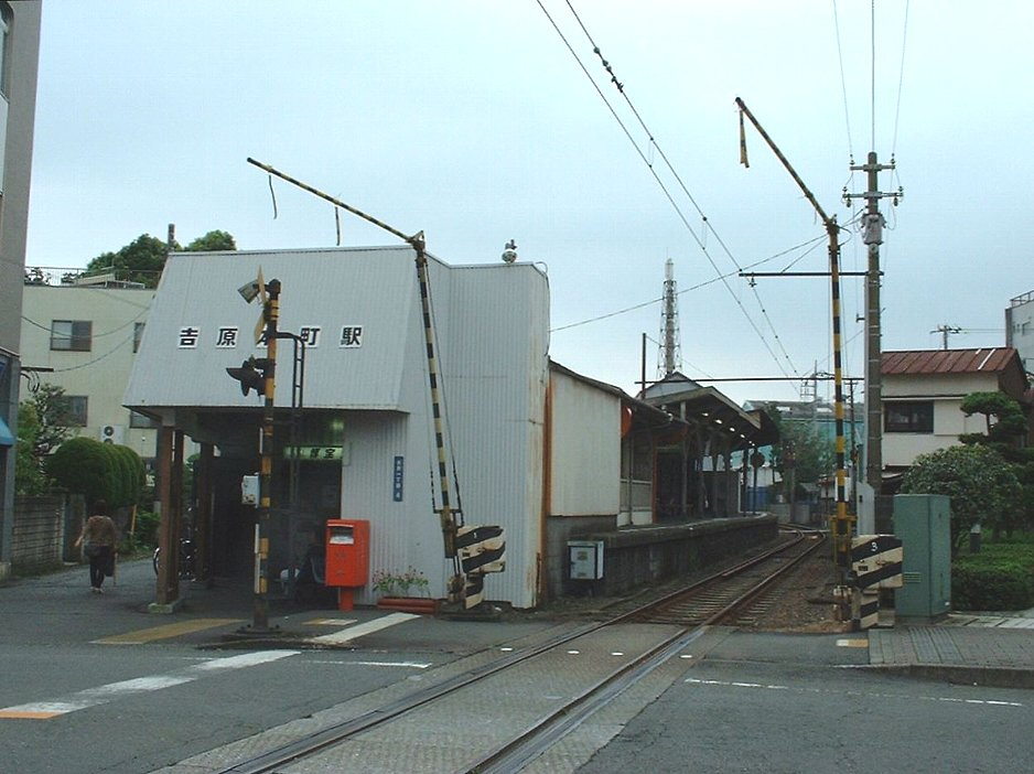 吉原本町駅